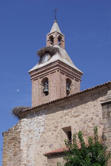 Iglesia Parroquial de Santiago Apóstol en Peraleda de la Mata. Construida en la 2ª mitad del siglo XVI.